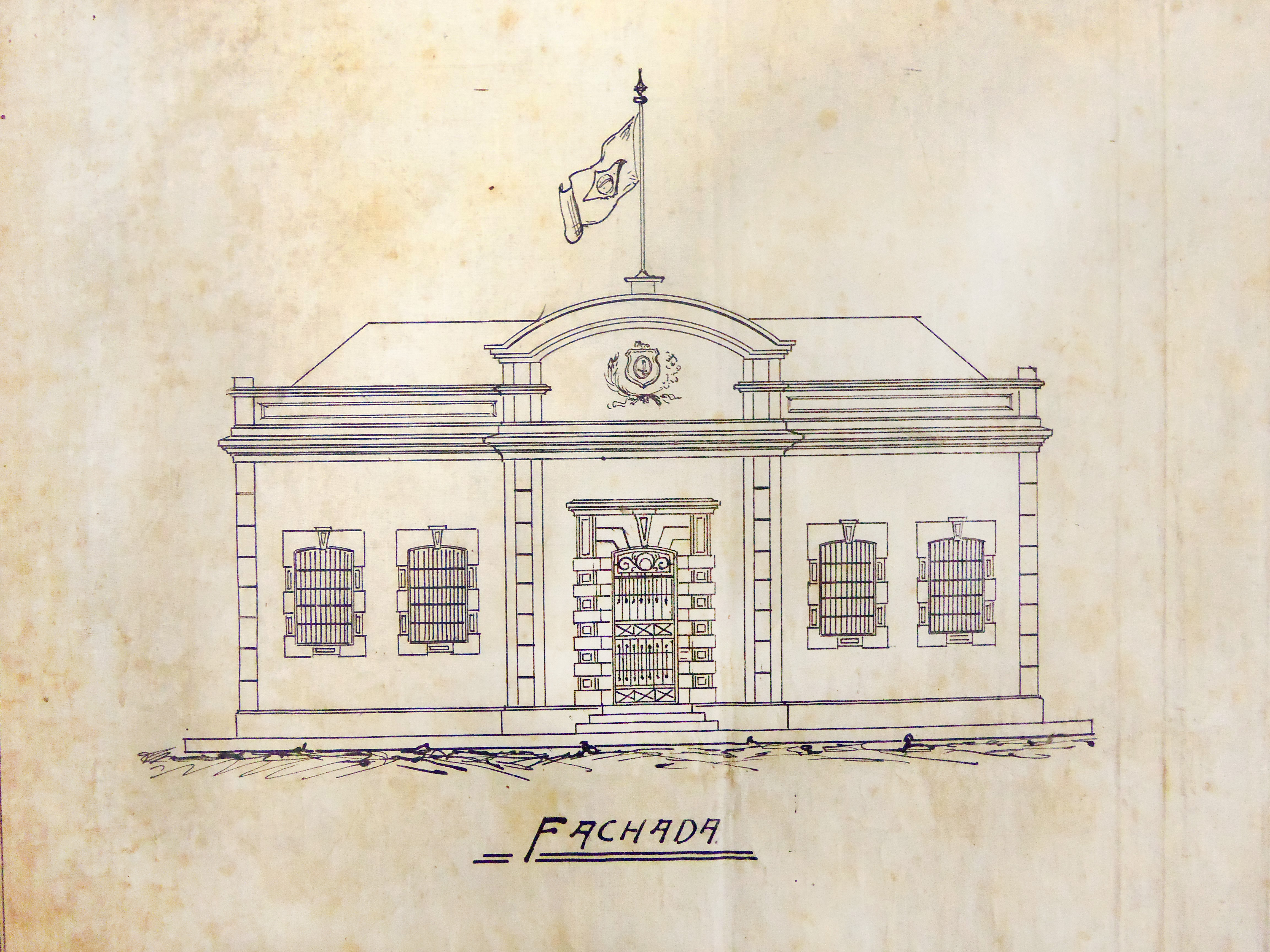 Português do Brasil: Fachada apresentada na Planta de construção da cadeia municipal de Jaboatão do ano de 1922 desenhada por M. Machado; J. Azevedo Telles